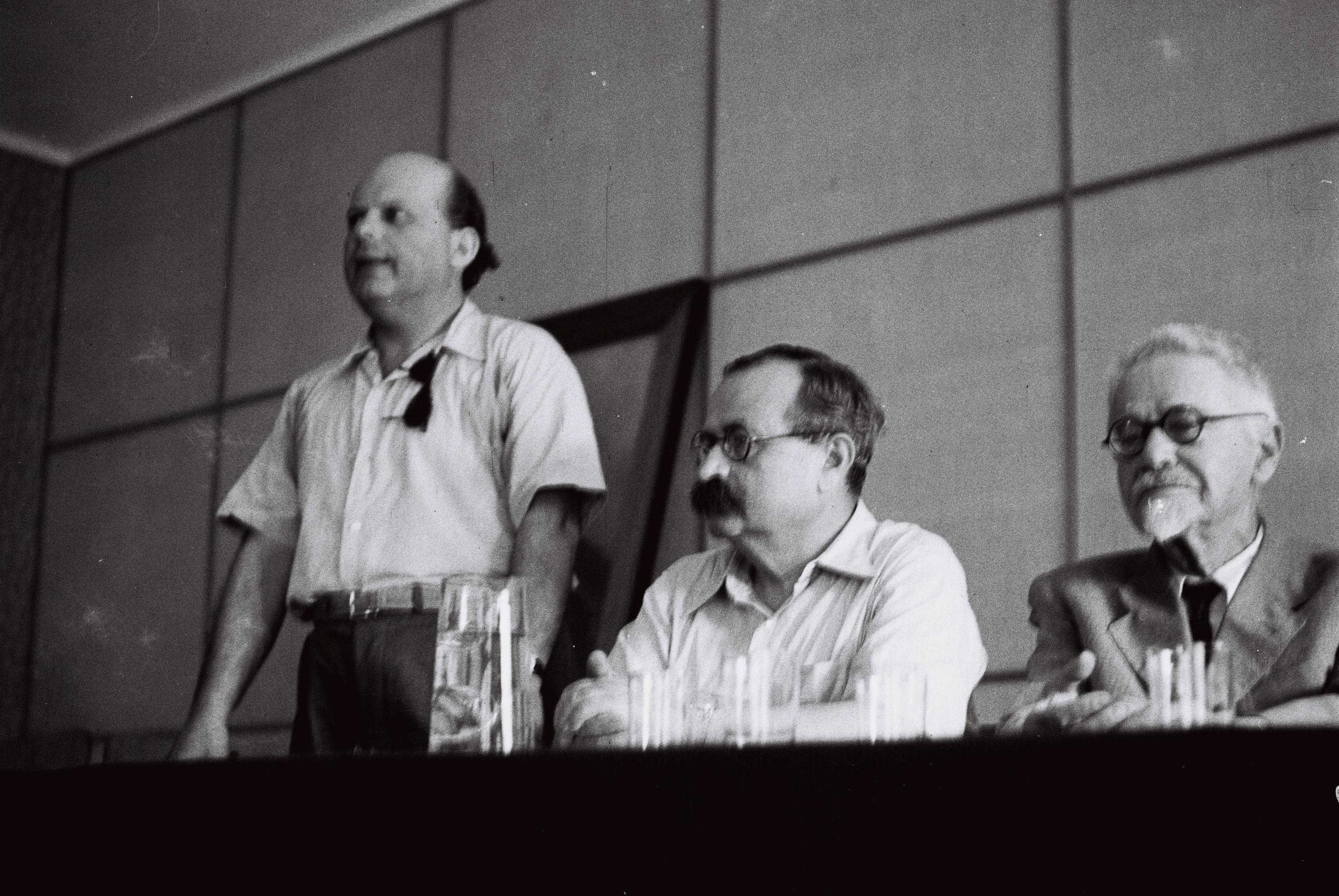 אשר ברש, ש. שלום ונחום סלושץ באסיפת סופרים עבריים בתל אביב